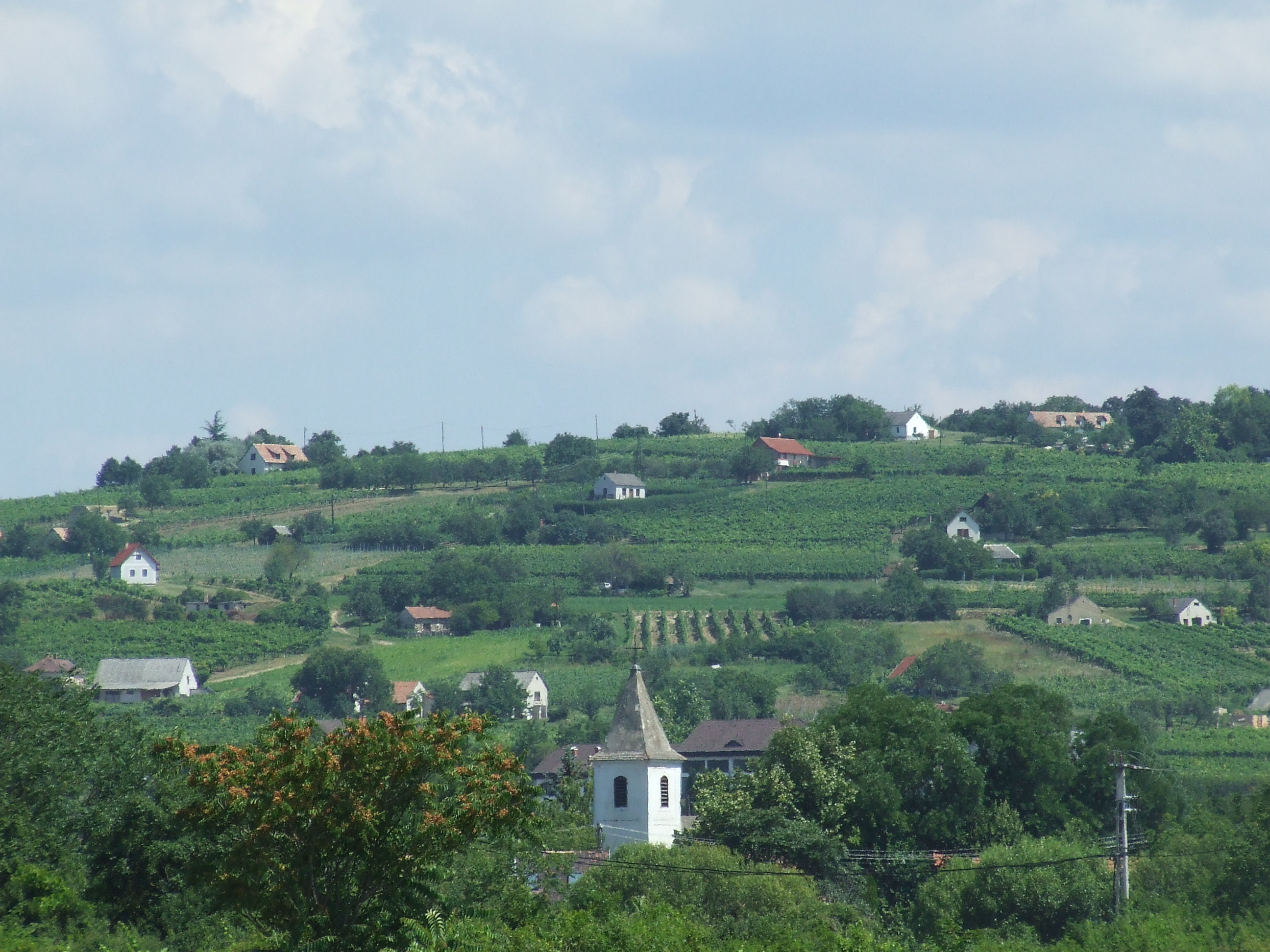 Tagyon